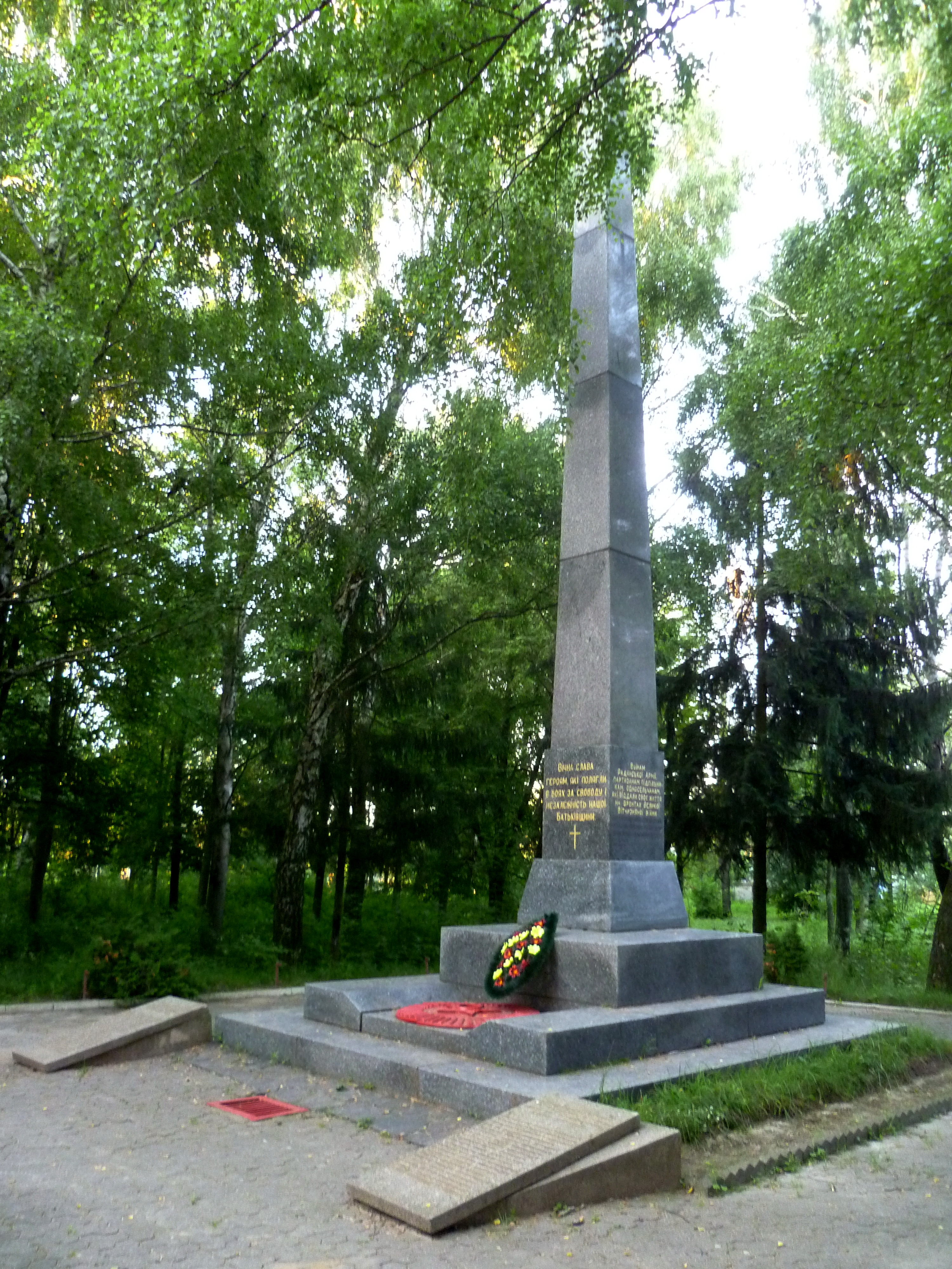 Пам’ятник на честь радянських воїнів, партизанів, підпільників і воїнів-односельчан (встановлений у 1967 році) - загальний вигляд - с.Хобултова Володимир-Волинський район Волинська область Україна